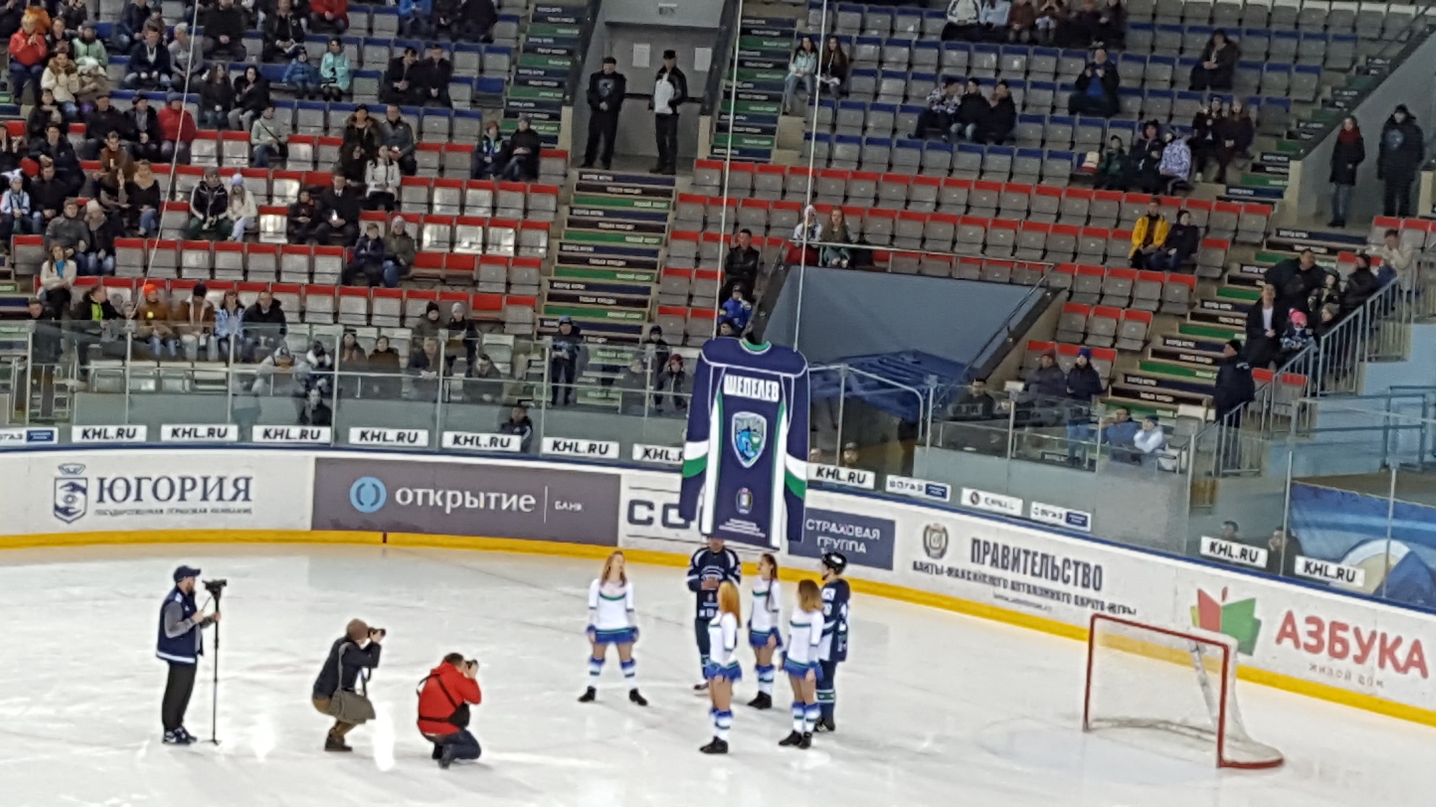 Während der Feierlichkeiten zum 10-jährigen Jubiläums des Eishockeyclubs HK Chanty-Mansijsk Jugra wird das Trikot von Sergei Schepelew unter das Hallendach gezogen